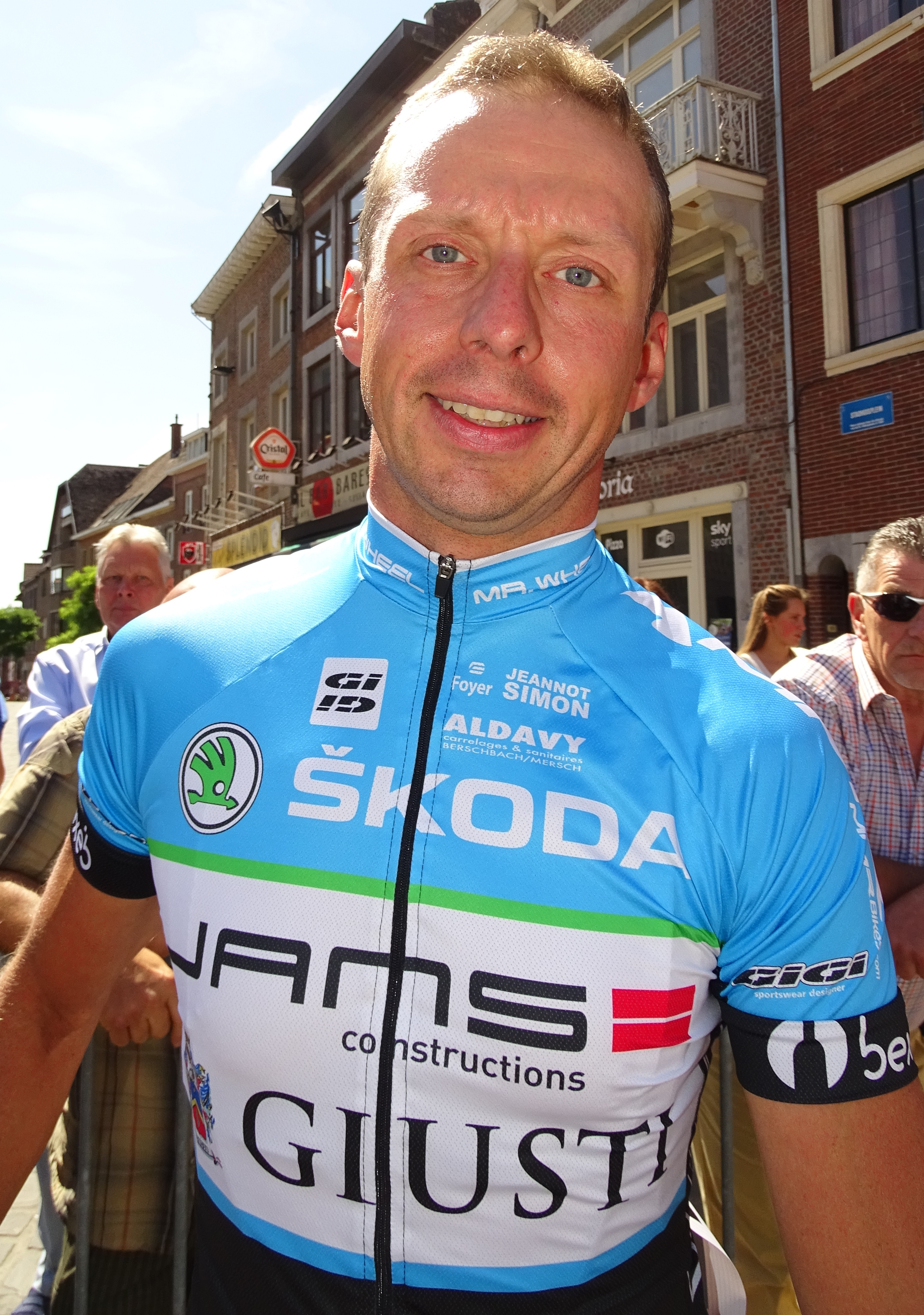 Reportage réalisé le dimanche 14 juin à l'occasion du départ et de l'arrivée du Tour du Limbourg 2015 à Tongres, Belgique.